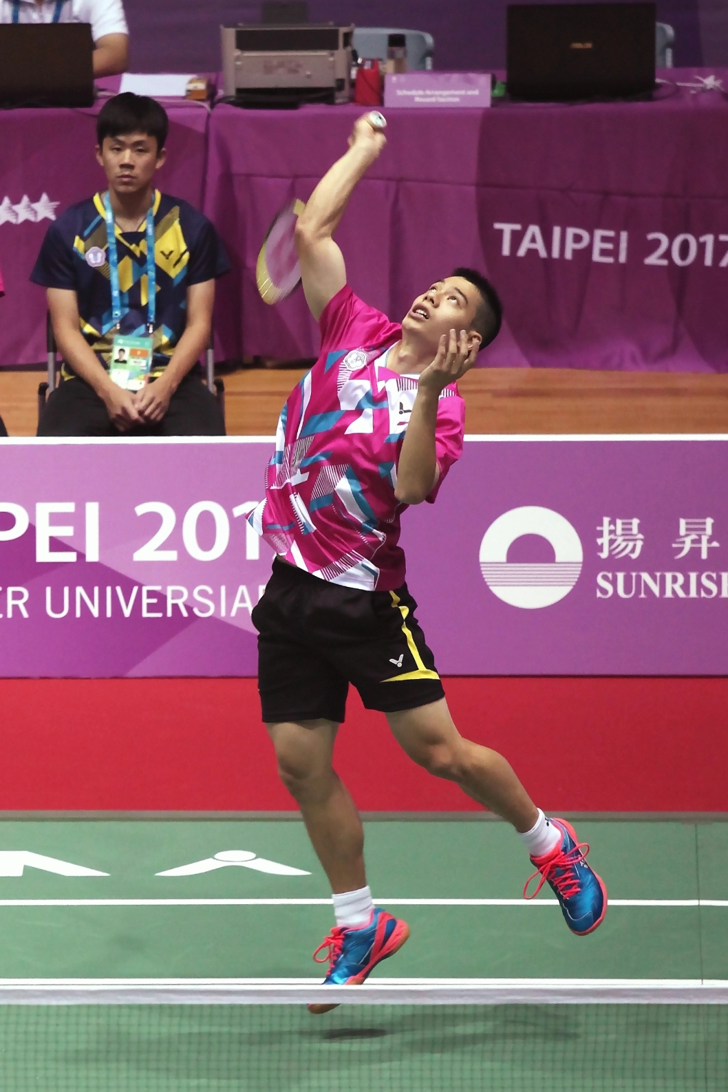 2017 臺北世大運混和團體男單 許仁豪 01